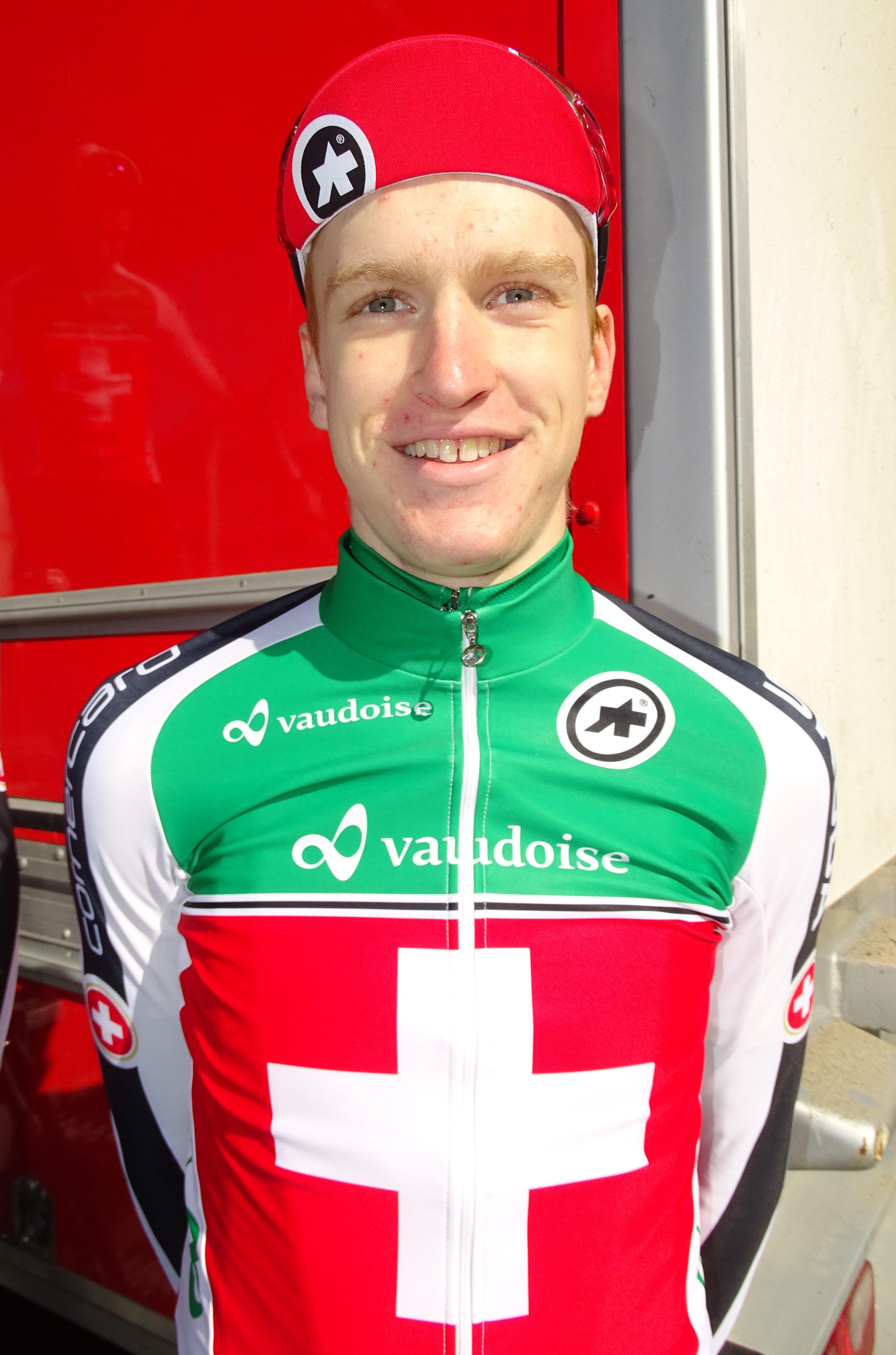 Reportage réalisé le dimanche 10 avril à l'occasion du départ du Paris-Roubaix juniors 2016 à Saint-Amand-les-Eaux, France.